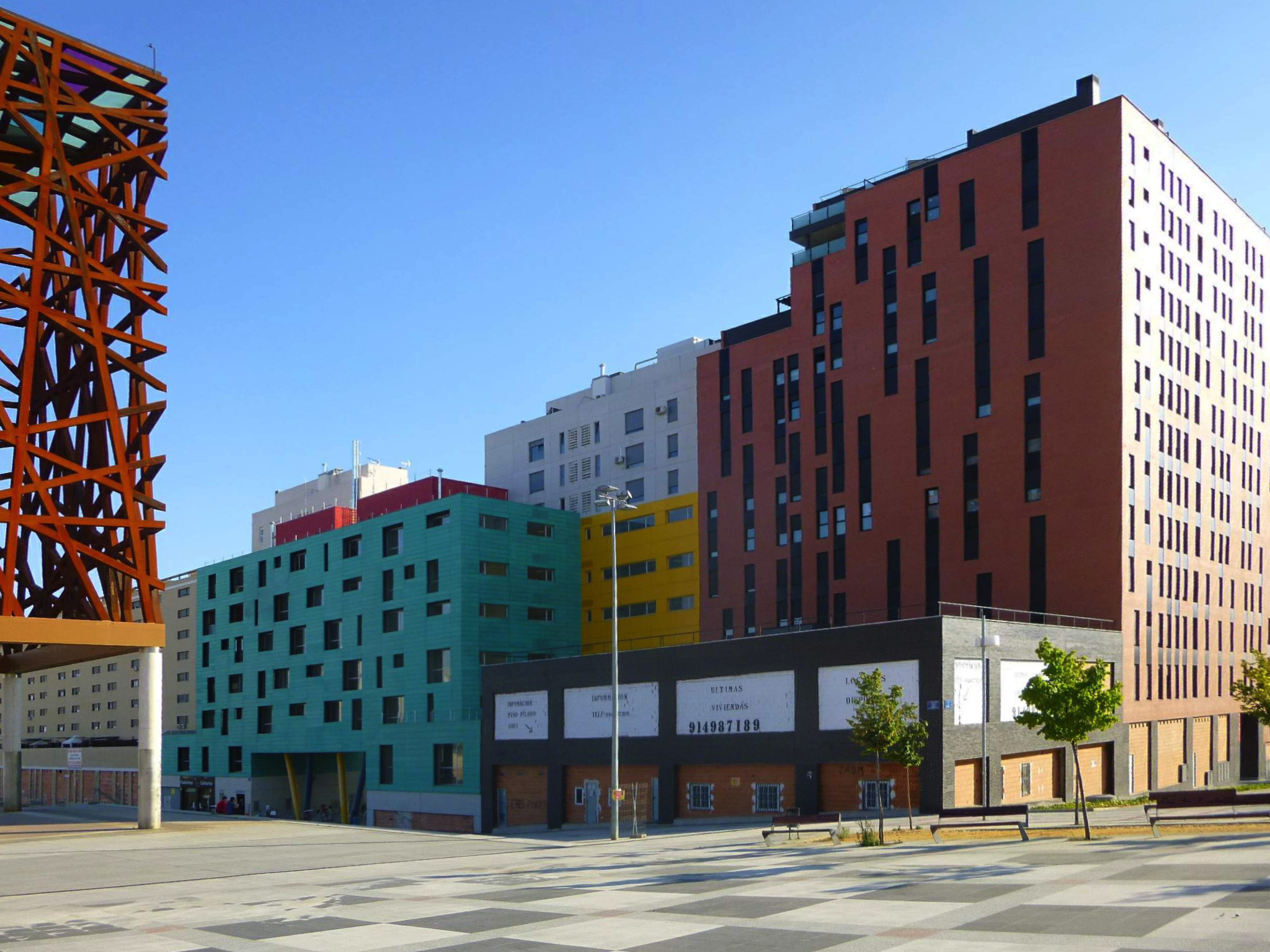 Plaza del Sol (Móstoles)